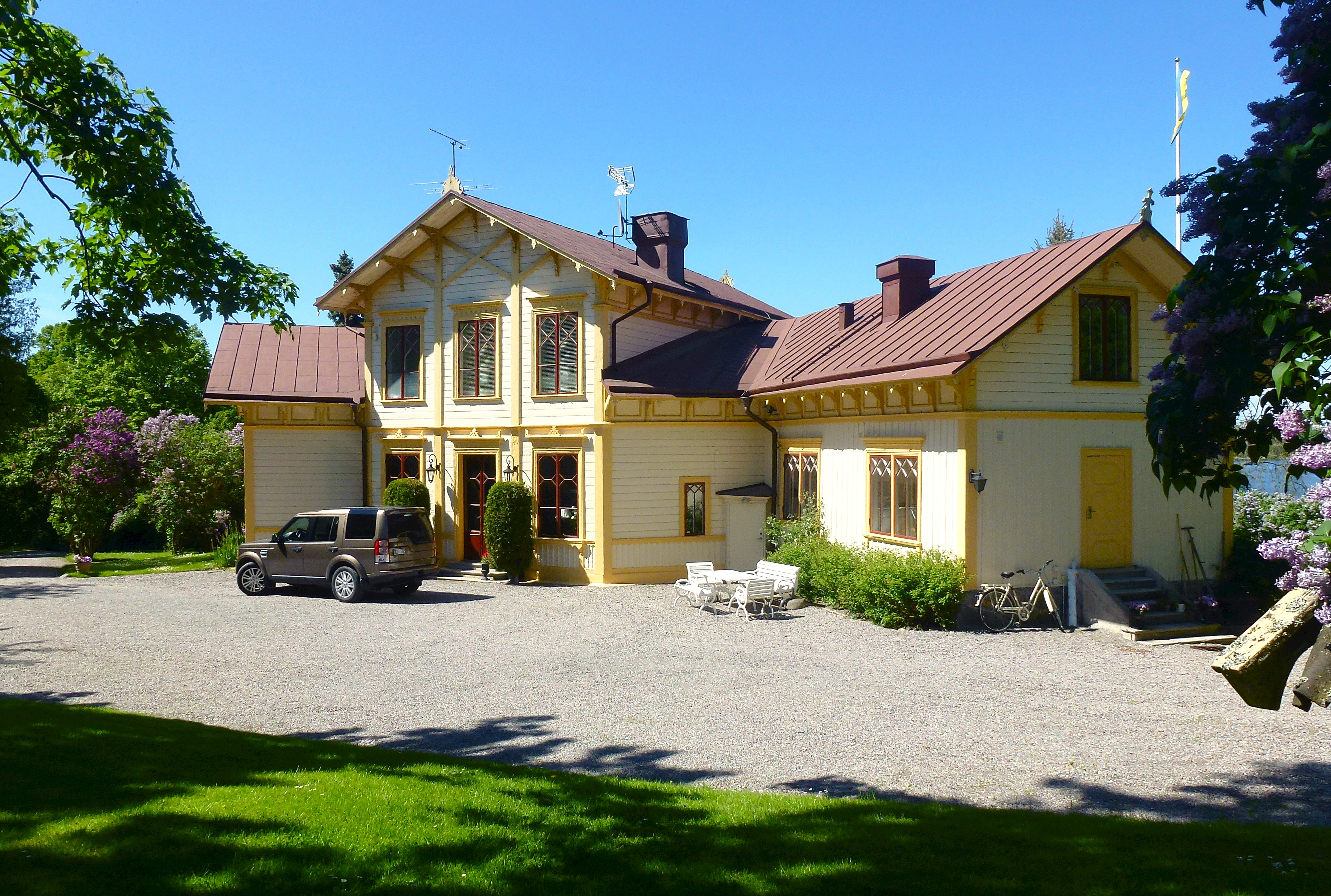 Villa Loviseberg på Ulriksdals slotts område